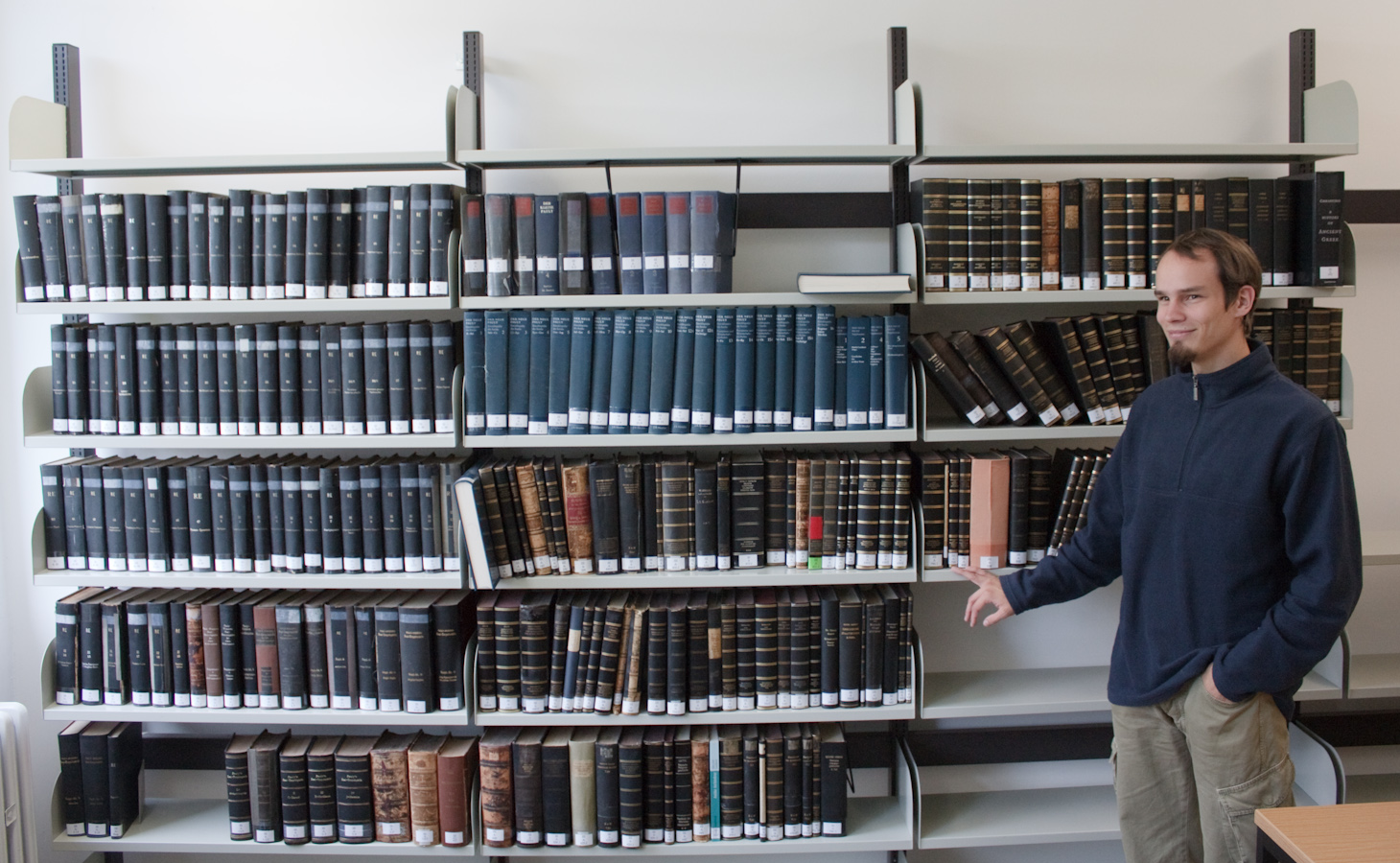 Bücherregal mit dem Pauly-Wissowa-Kroll-Ziegler (links, samt Original-Pauly), dem Kleinen Pauly (Mitte, obere Reihe), dem Neuen Pauly (Mitte, zweite Reihe von oben) und dem Handbuch der Altertumswissenschaft (Mitte unten und rechts). Daneben steht ein normalgroßer Mann zum Größenvergleich.